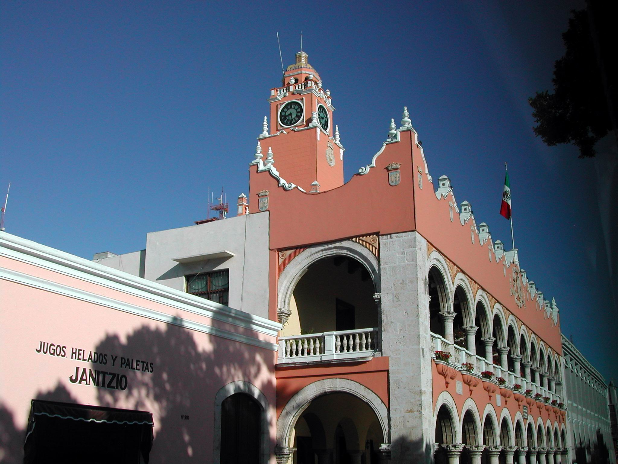 Motiv: Mérida (Mexiko) Rathaus Ort: Mérida, Mexiko, Yucatán Aufnahmedatum: Dezember 2005 Fotograf: Dieter Mueller (dino1948) Kamera: Nikon 885 Lizenz: GNU FDL